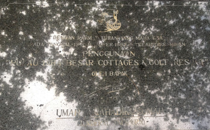 Merupakan sebuah batu piagam peresmian Pulau Bira